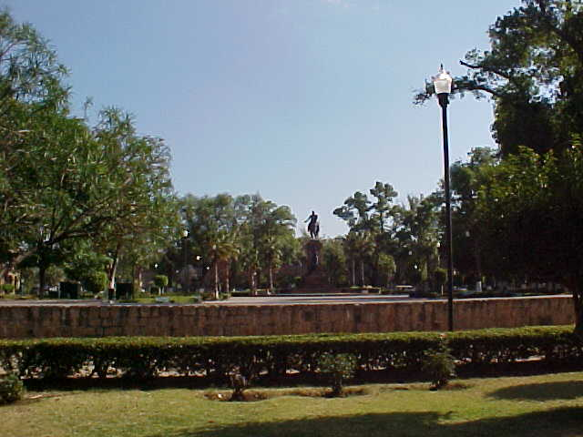 Plaza Morelos, en Morelia (Morelos Square, in Morelia City)